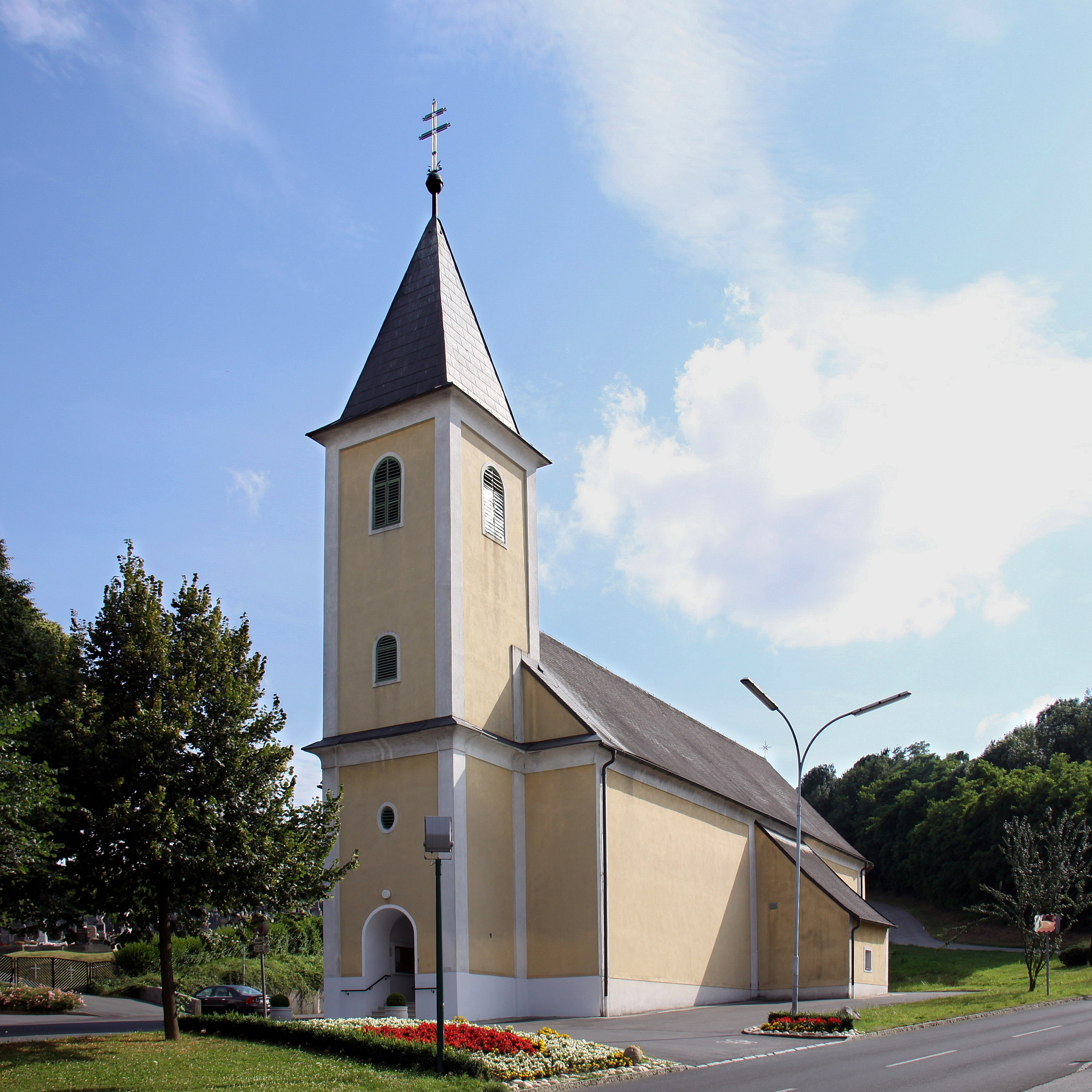 Denkmalgeschützte römisch-katholische Pfarrkirche hl. Katharina in Unterwart Object location47° 15′ 31.3″ N, 16° 13′ 58.23″ E